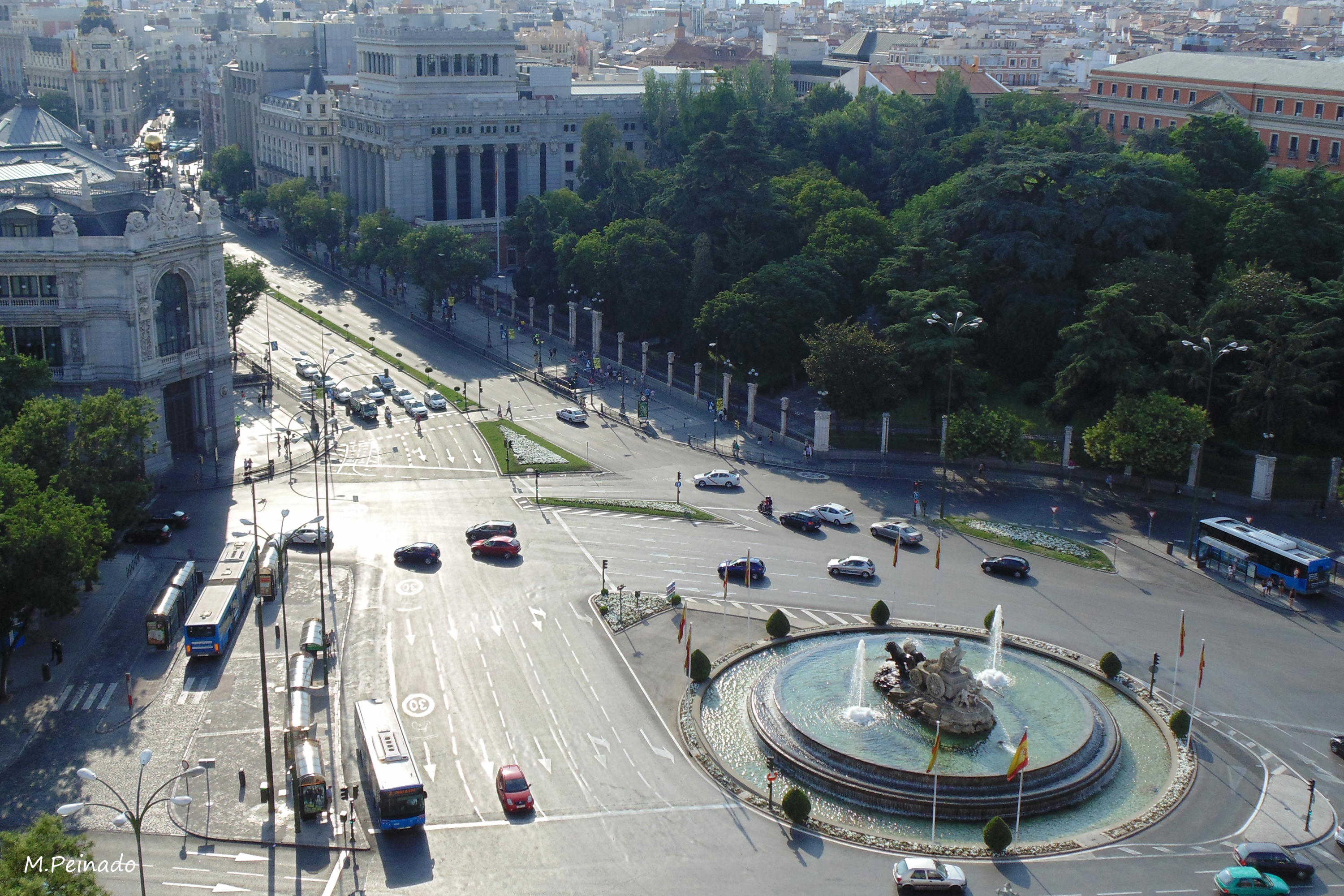 Plaza de Cibeles y Calle Alcalá Tomada desde el mirador del Palacio de Cibeles Plaza de Cibeles Madrid Comunidad de Madrid España